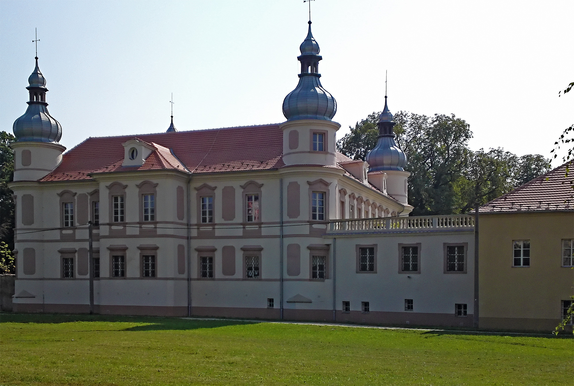 Zámek Krásné Březno, Krásné Březno 1